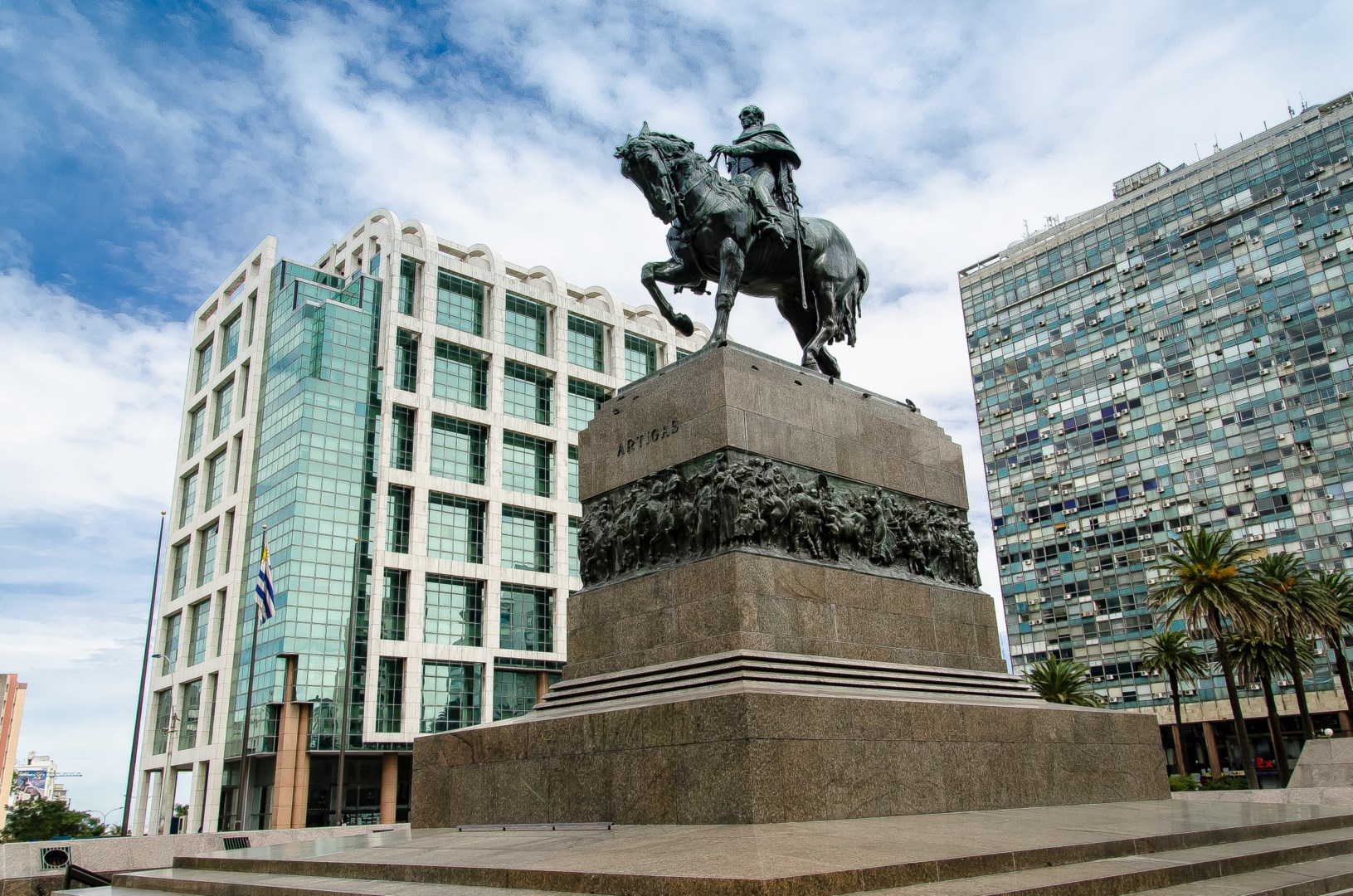 General José Artigas (estatua ecuestre de Plaza Independencia). Ubicada en el departamento de Montevideo